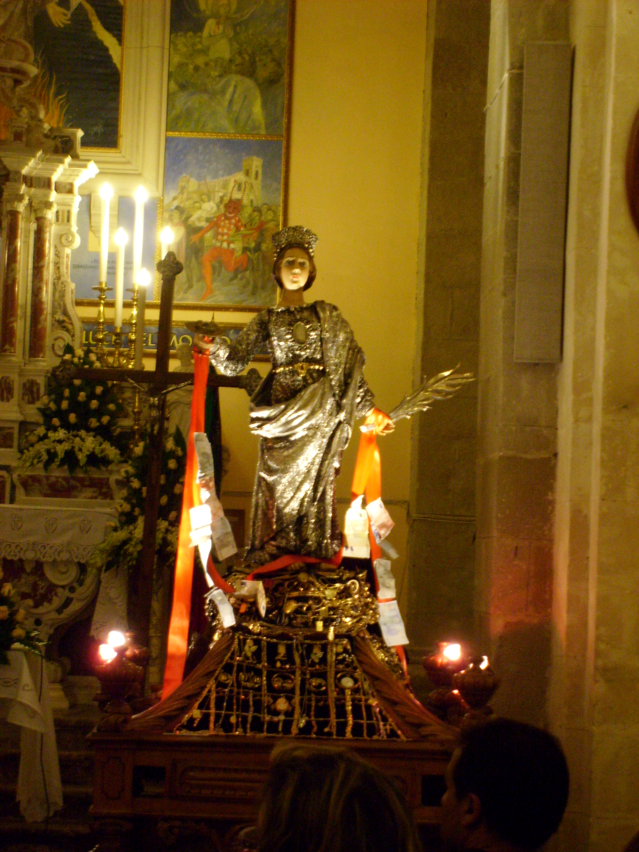 la statua di Santa Lucia